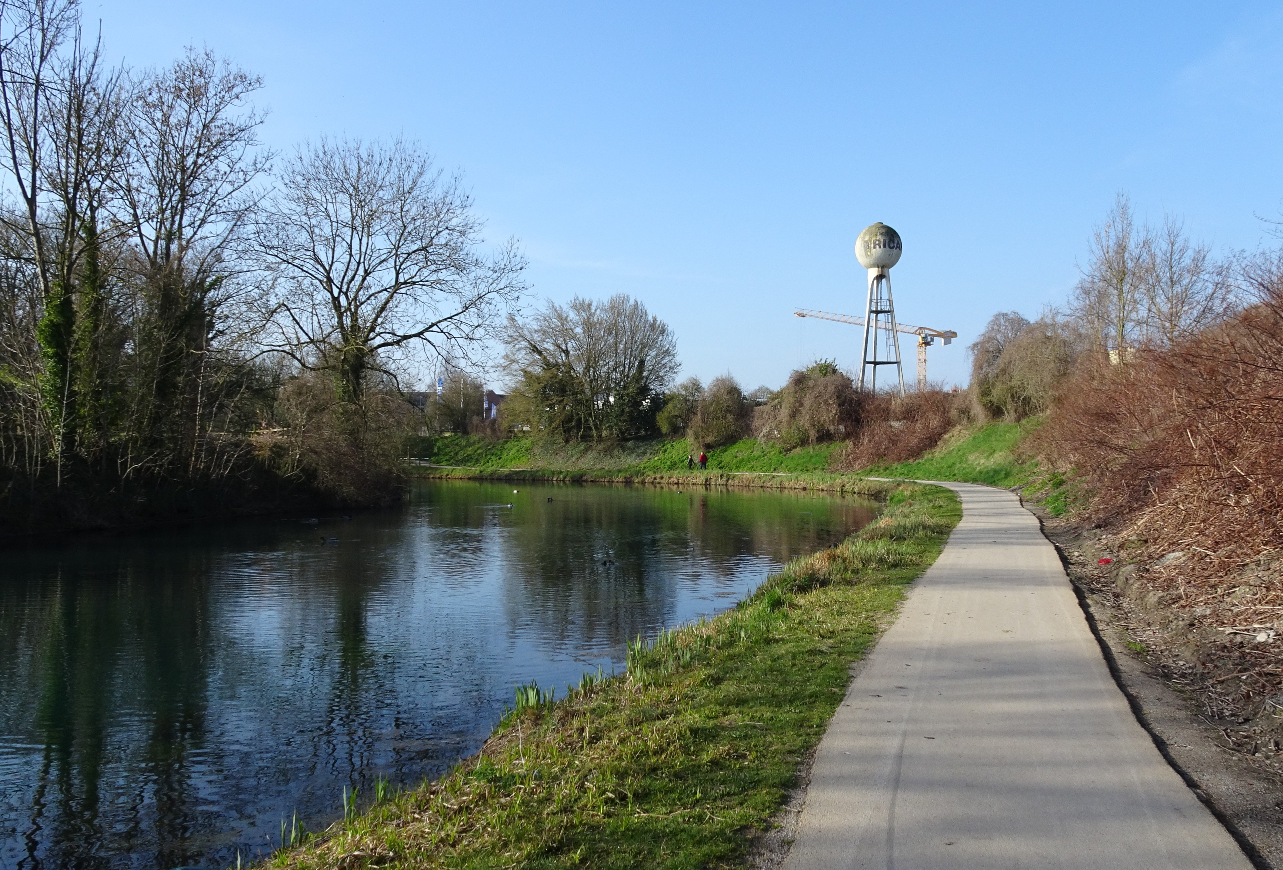 Canal de la Scarpe, en amont d'Arras